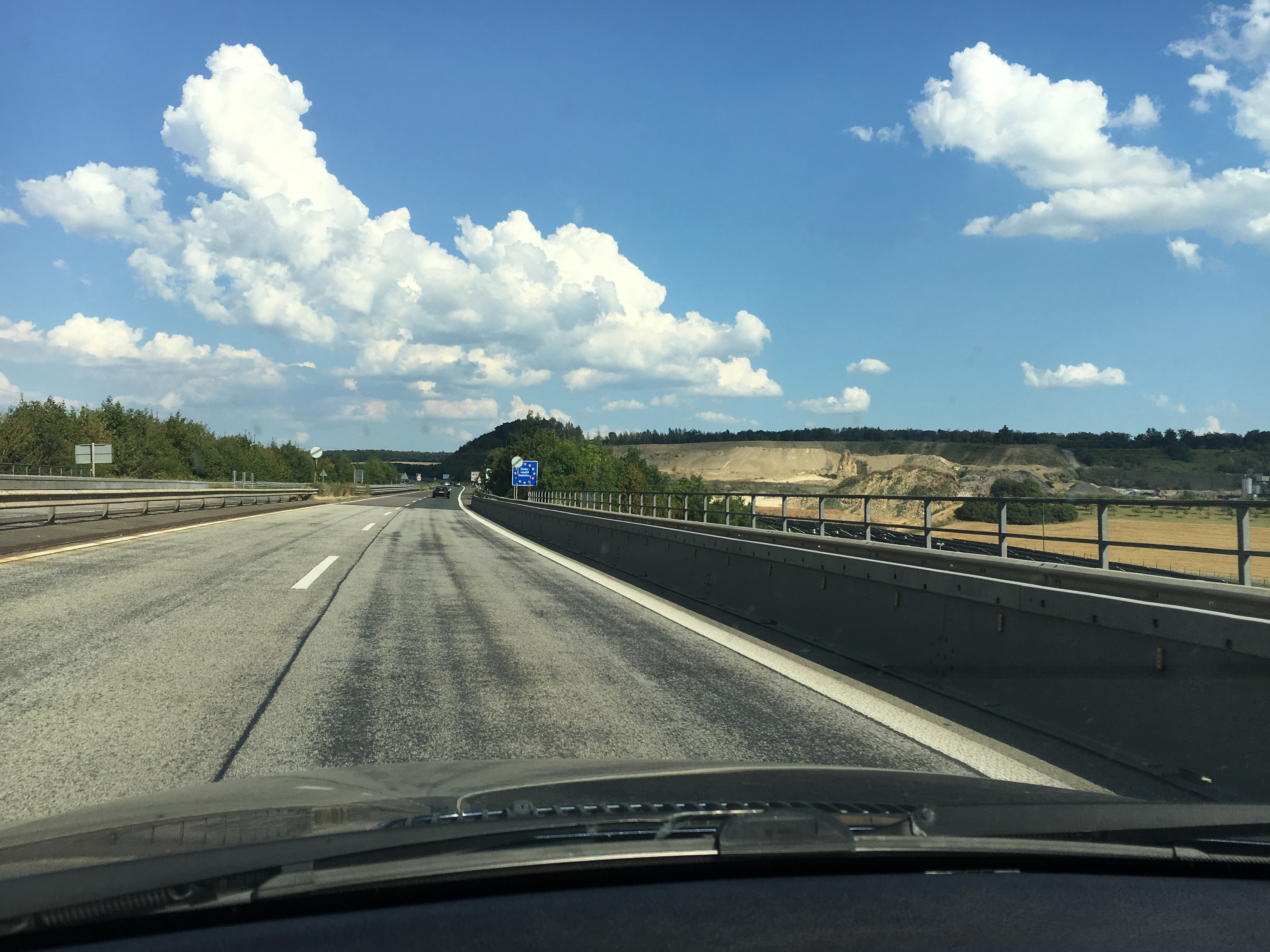 Deutsch-Luxembourgische Grenze im Schengenraum